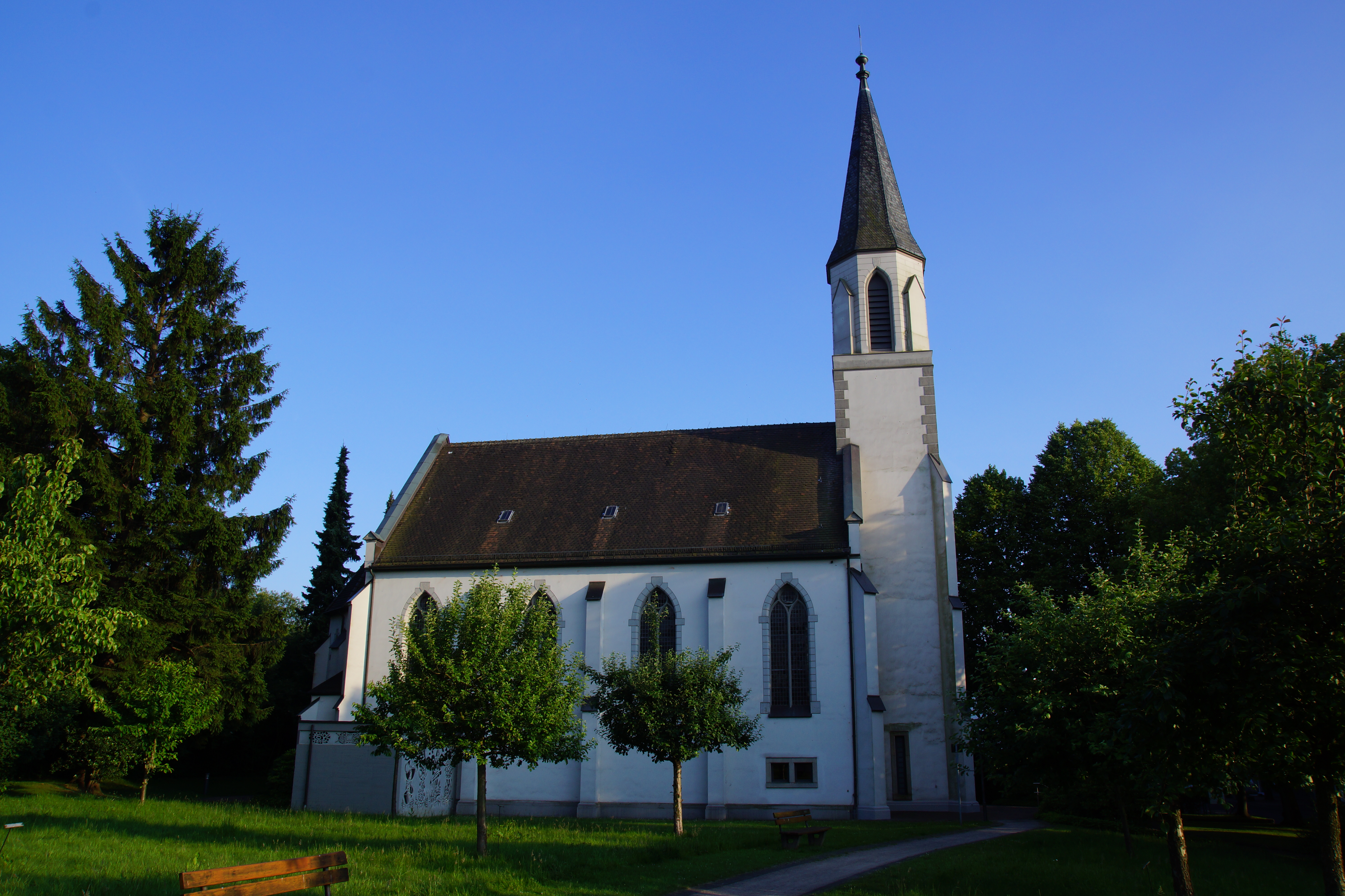 Church (Ketzberg) in Solingen